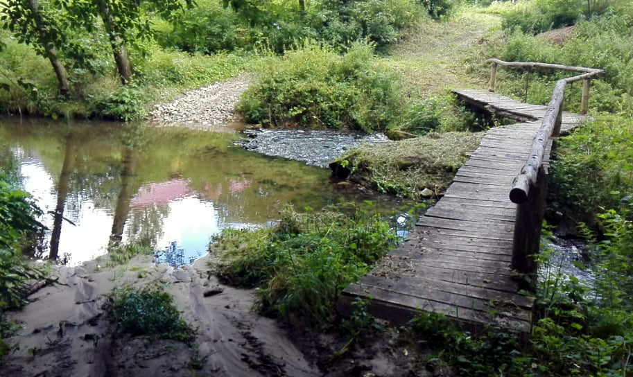 Krzywy Mostek w Nowinach